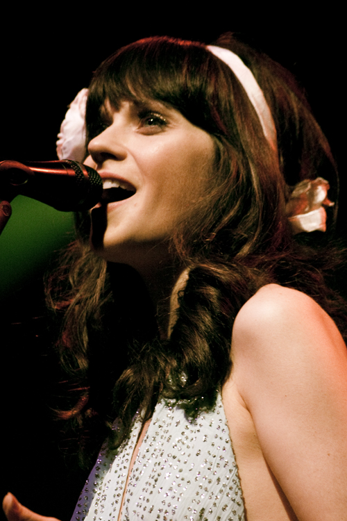 Terminal 5, NYC